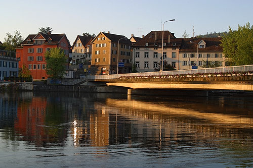 Feuerthalen - Schaffhausen: Rheinbrücke (Nr. 03.1-5186)